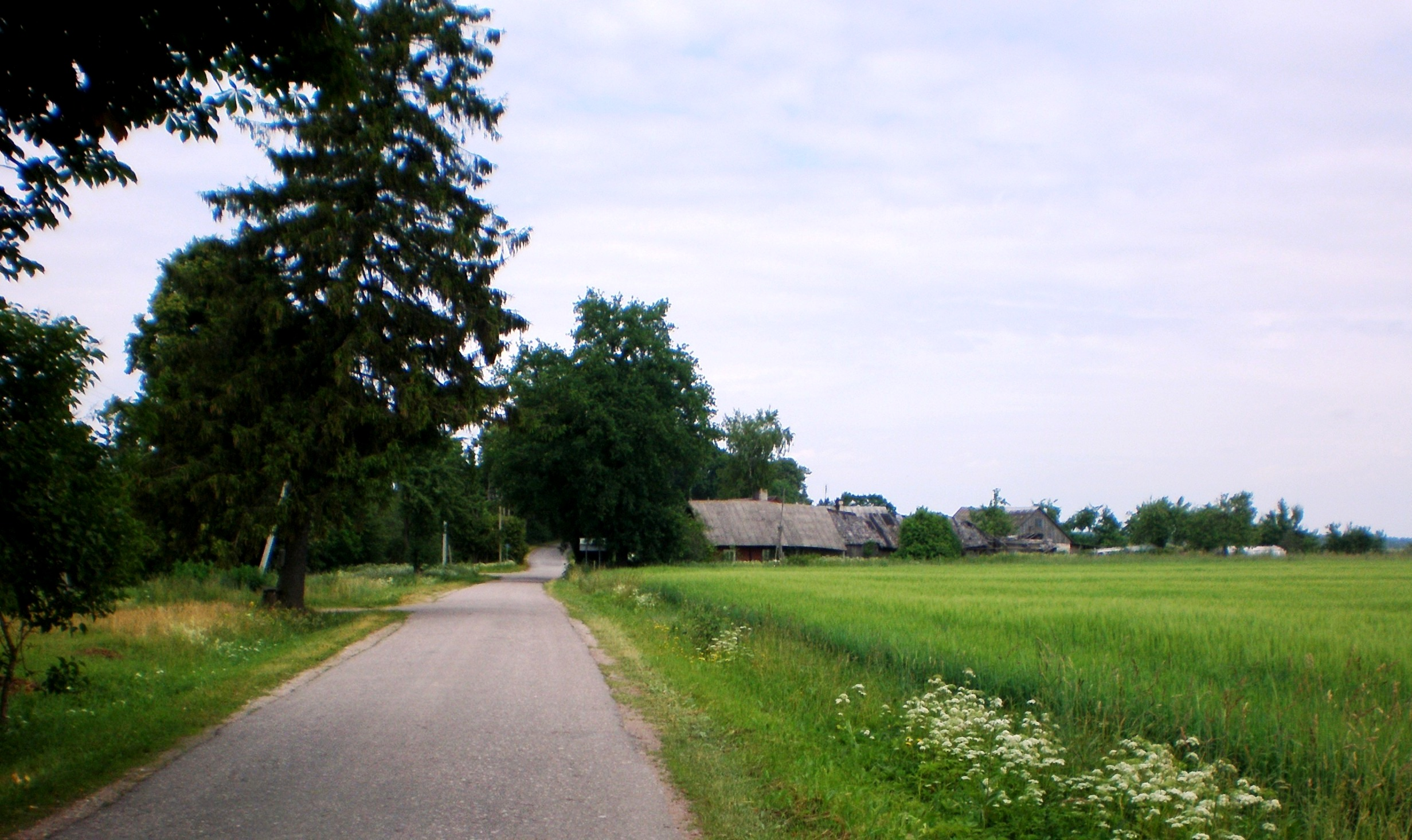 Ibutoniai, Panevėžio raj.